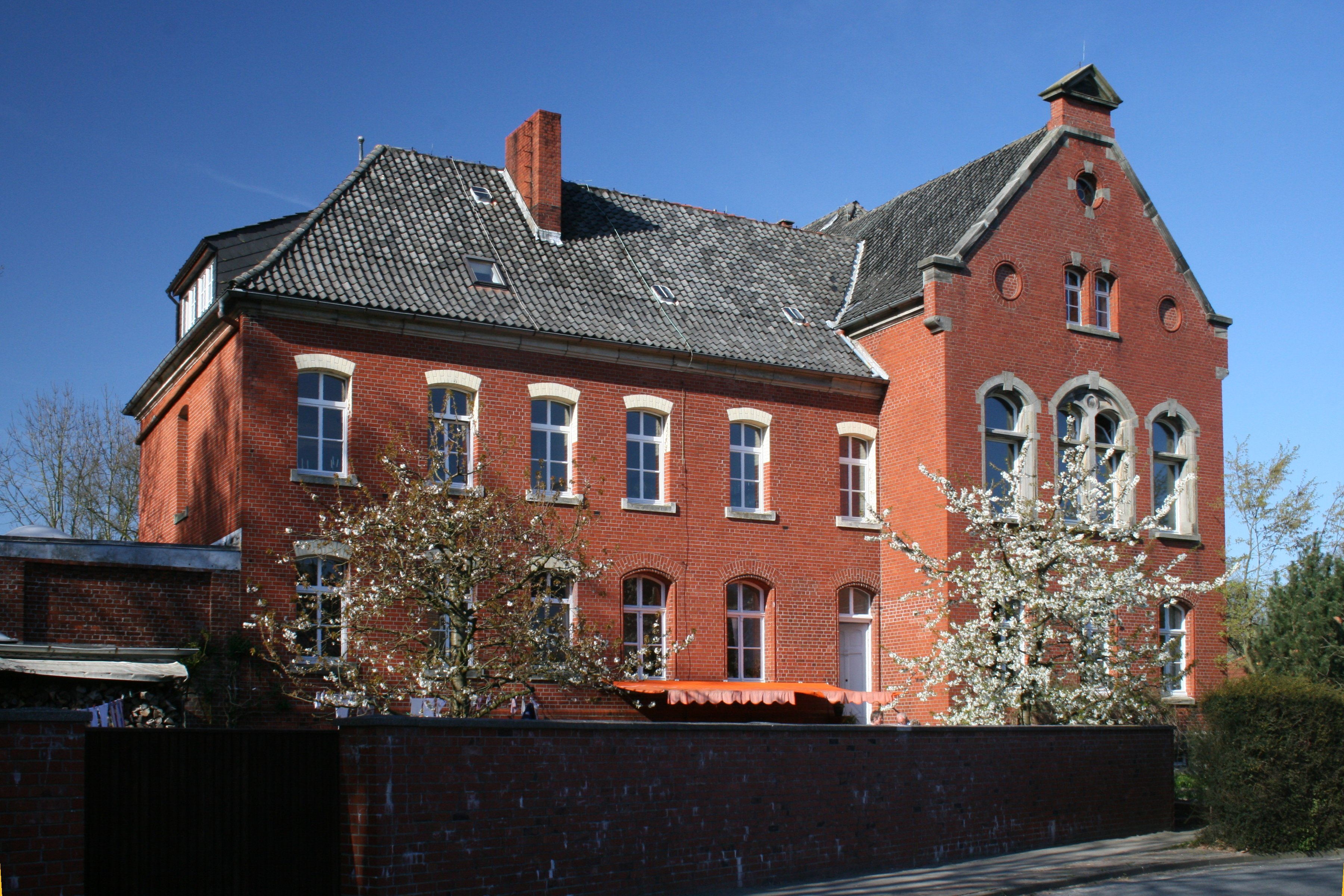 Neuhaus (Oste): Das alte Amtsgericht